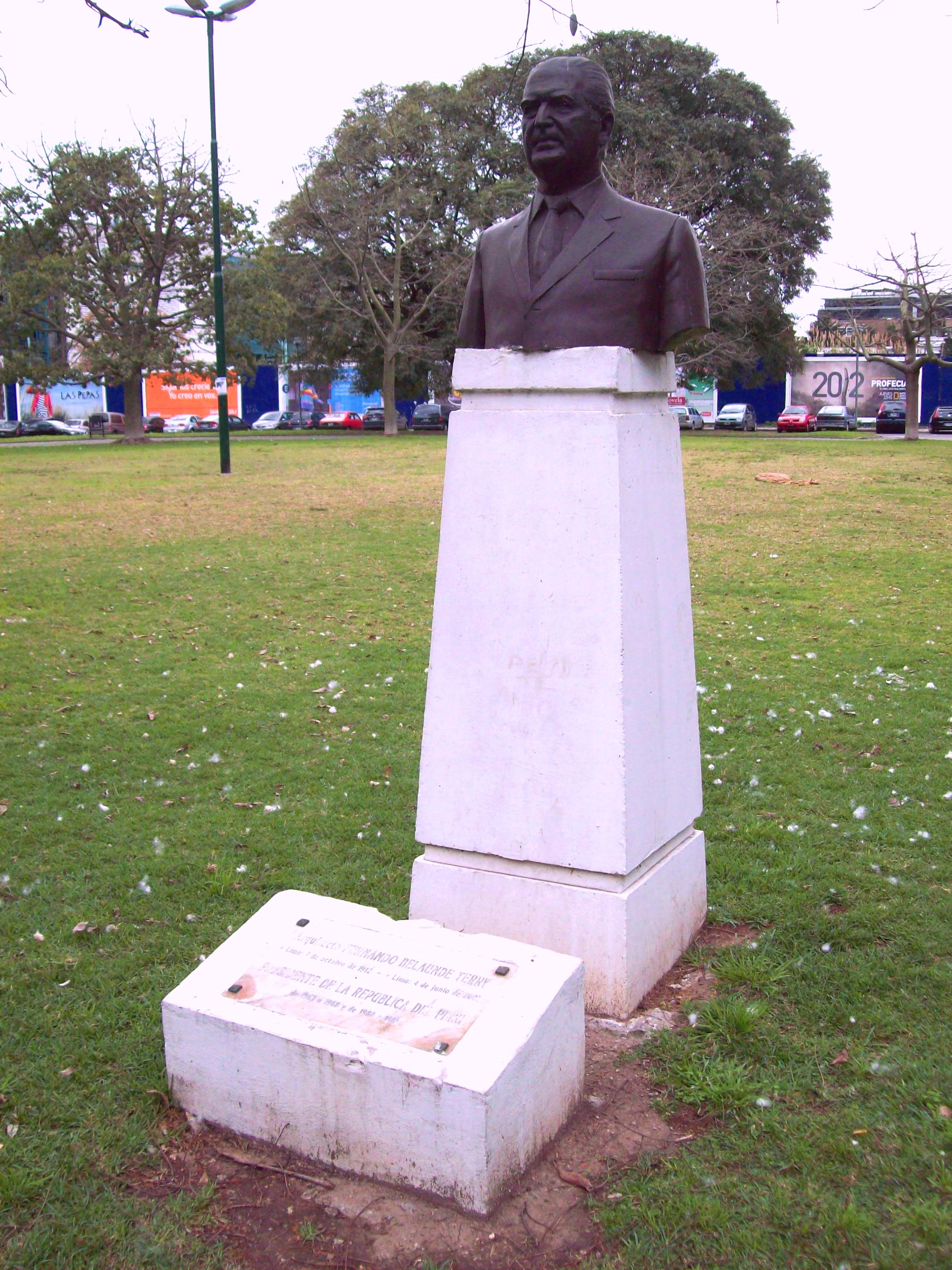 Monumento a Fernando Belaúnde Terry en Plaza República del Perú, Buenos Aires.